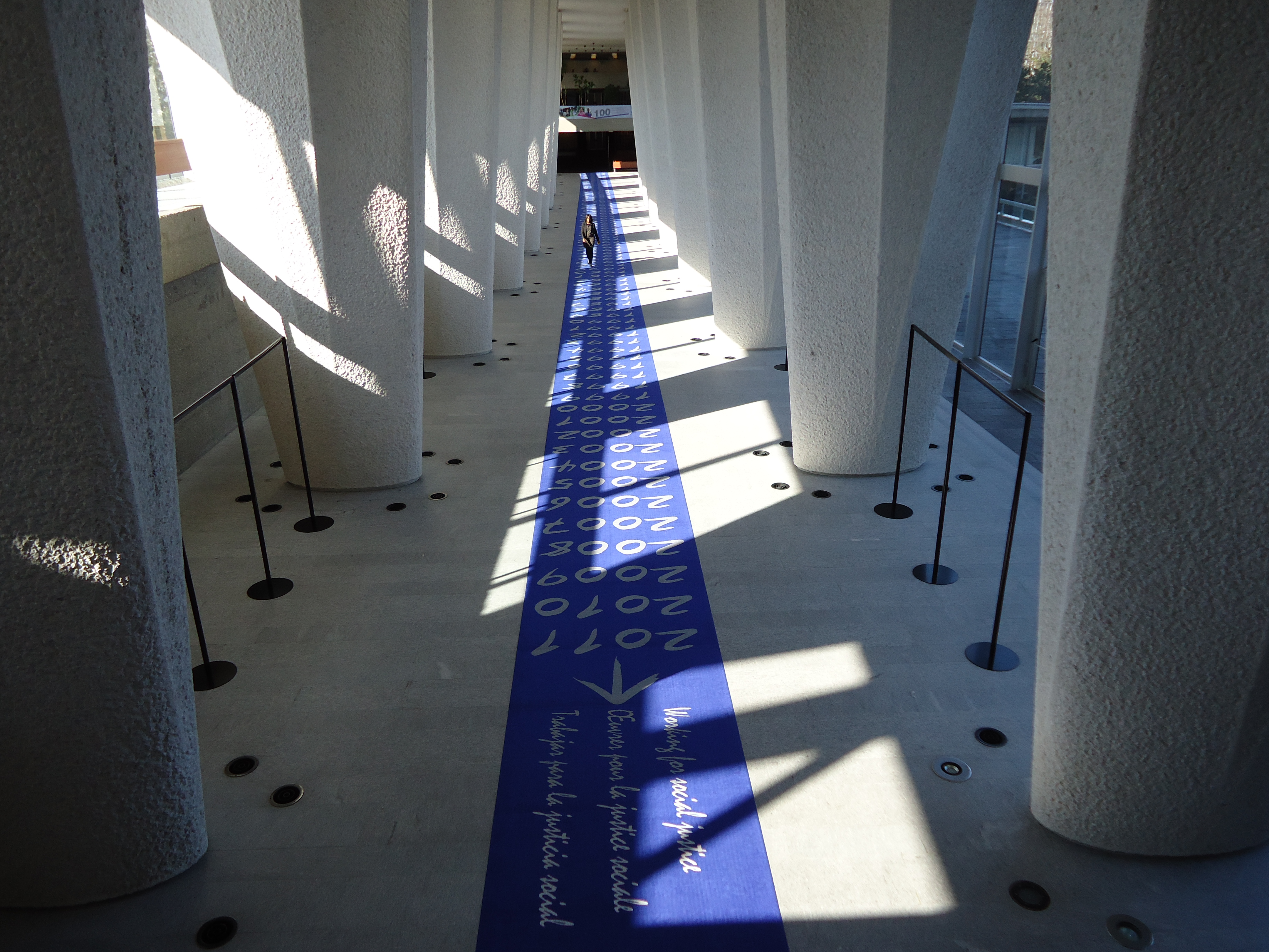 Intérieur du Bureau International du Travail, Genève